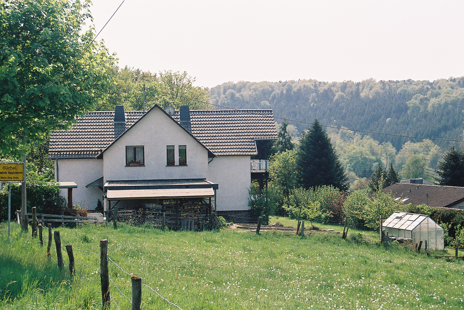 Haus von Franz M. Jansen und Fifi Kreutzer im Bröltal